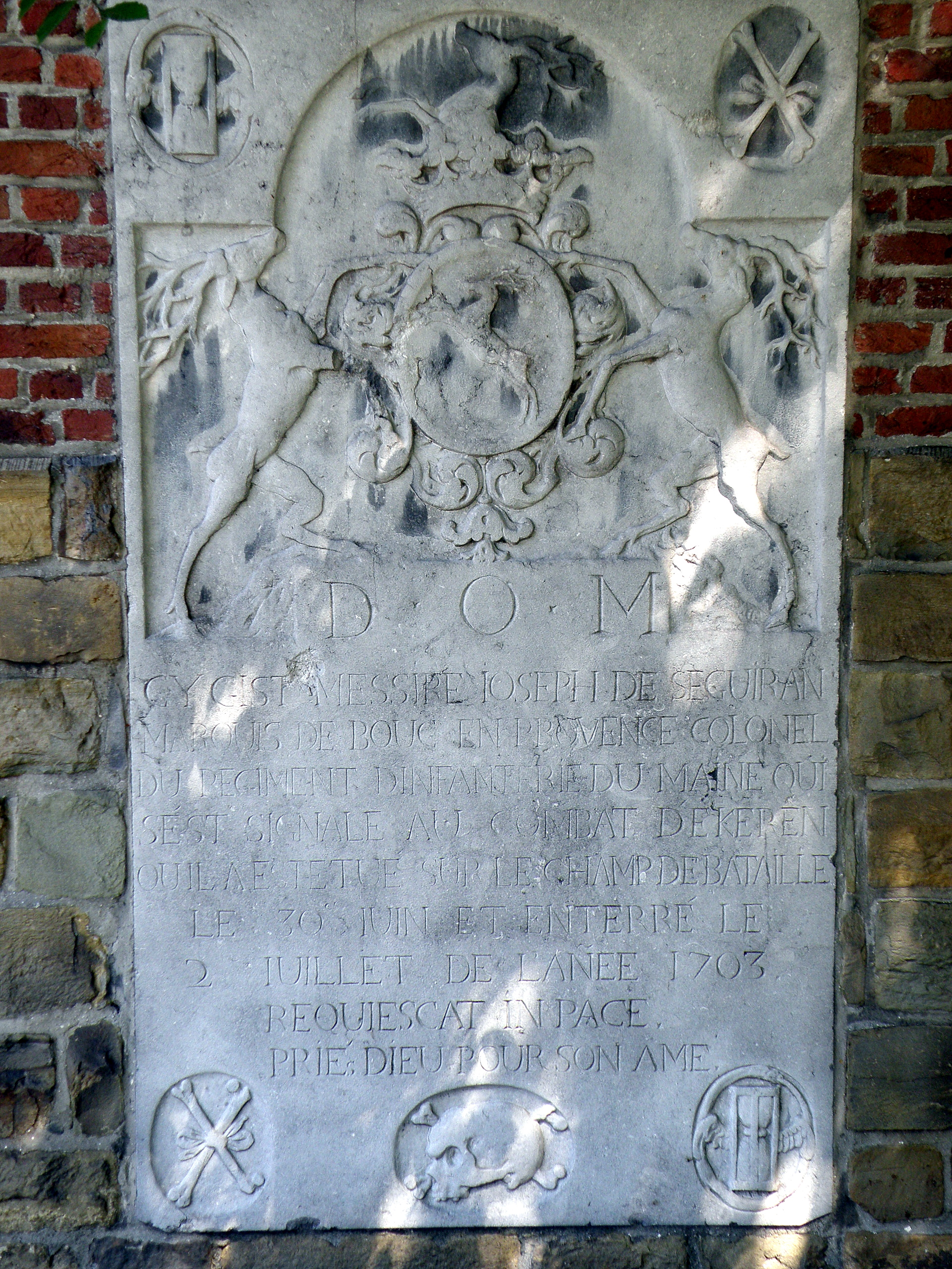 Église Saint-Bartholomé de Merksem (début XVIIe, agrandie en 1937), dans la proche banlieue nord-est d’Anvers. Enfeu dans le flanc sud.